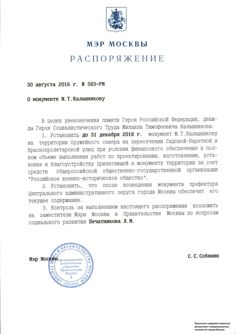 Распоряжение № 583-РМ от 30.08.16 «О монументе М. Т. Калашникову»